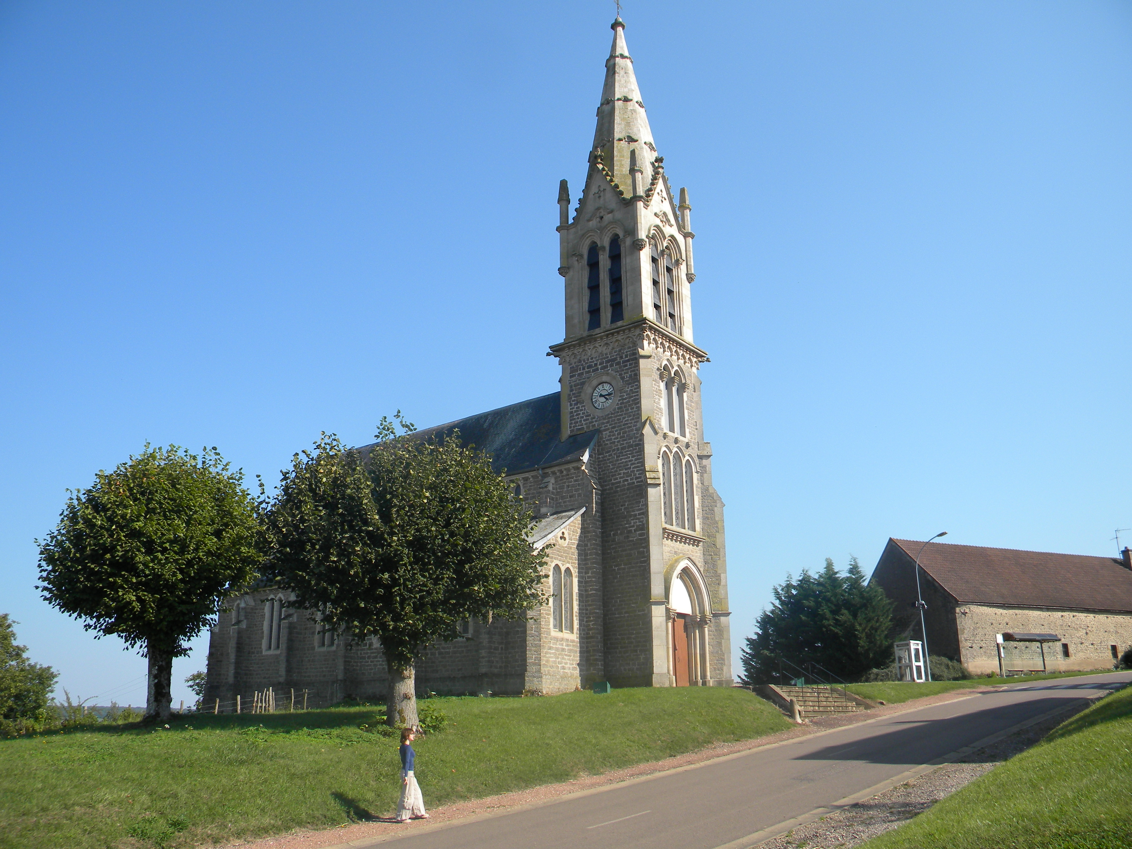 Chazilly village de Côte d'Or